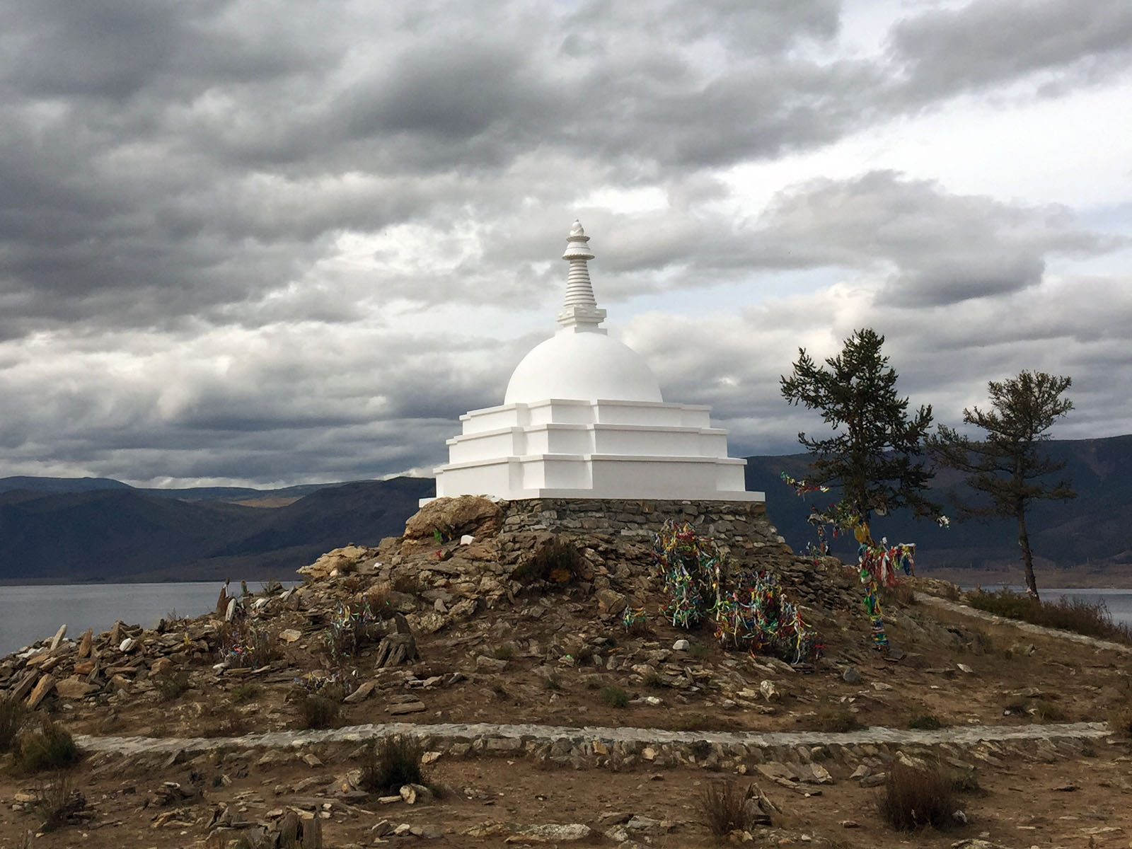 Буддистская Ступа Просветления на о. Огой